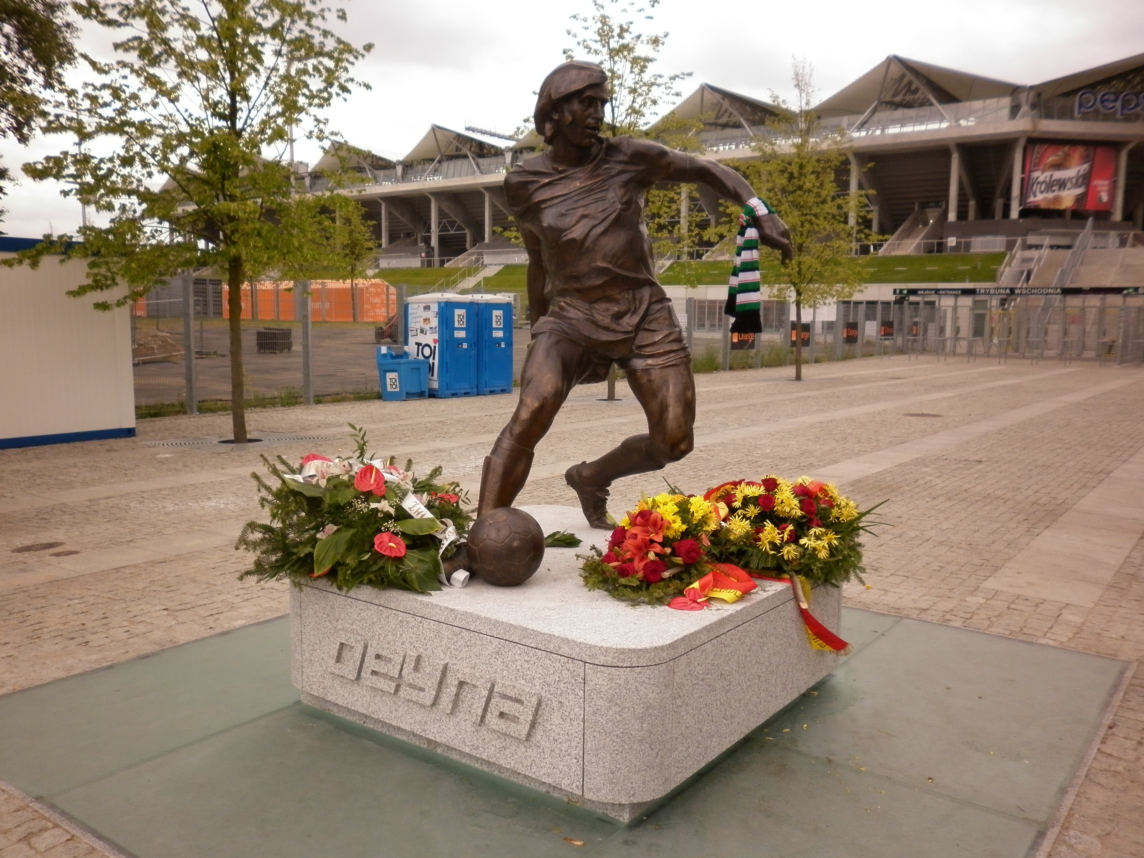 Pomnik Kazimierza Deyny przy ulicy Łazienkowskiej